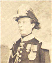 Afbeelding:Trani.jpg